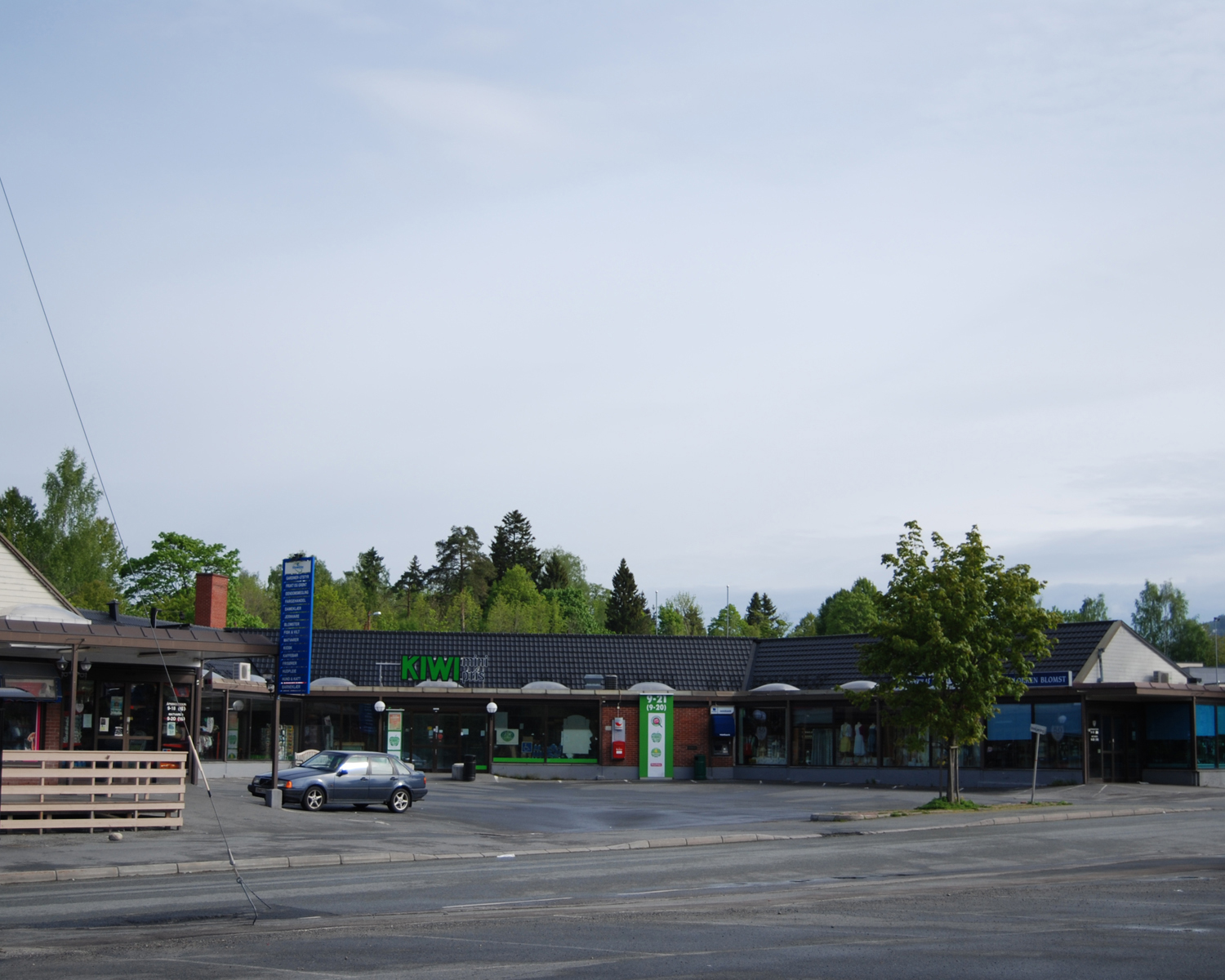 Eiksmarka Senter (Oslo) 24.05. 2009r.